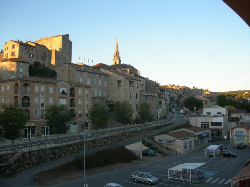 Vue générale de la ville de Joyeuse, département de l'Ardèche.